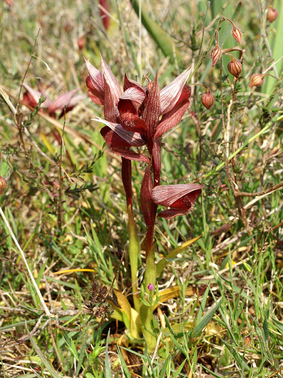 Serapias orientalis plant